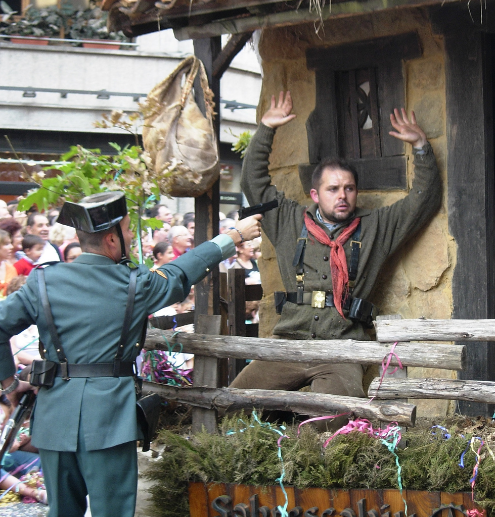 Un guardia civil detién a un fugáu na carroza de la peña «Como yera antes». (Dramatización)